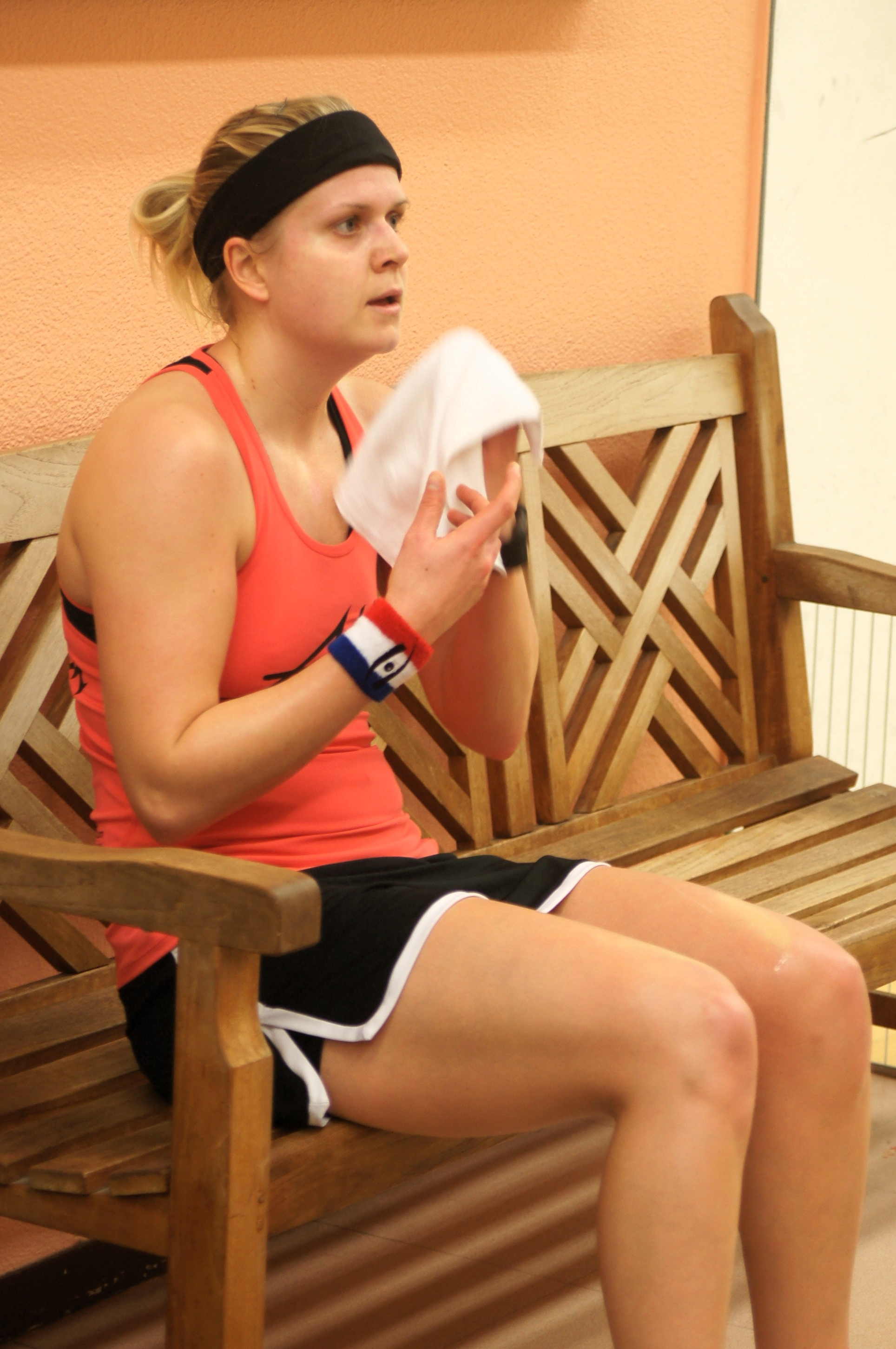 Fiona Moverley, Monaco Squash classic 2016